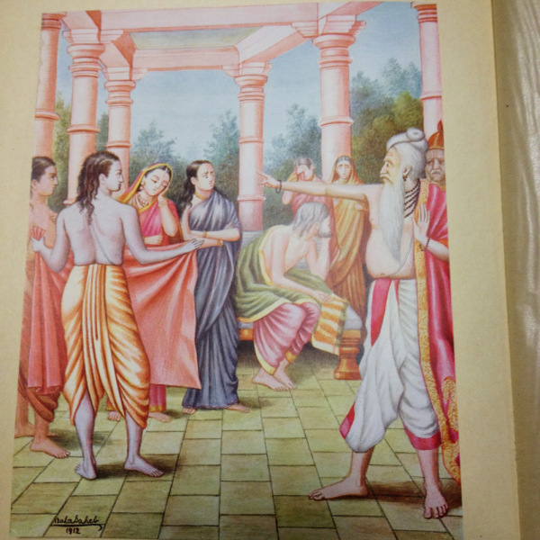 Chitra Ramayana (Illustrated Ramayana) is a simplified story of the great Indian epic in Kannada. The type is bold and beautiful. The thick pages have become brittle and need careful handling. Printed by B. Miller, Superintendent, British India, Press, Mazgaon, Bombay. It was published by, Shrimat Balasaheb Pandit Pant Pratinidhi, chief of Aundh, at Aundh, Satara district. The Kannada version is by Ramachandra Madhwa Mahishi The date shown is 1916. It is all the more important because the book contains illustrations painted by the publisher also called Bhavan Rao Shrinivas Rao, the ruler of the state of Aundh himself.